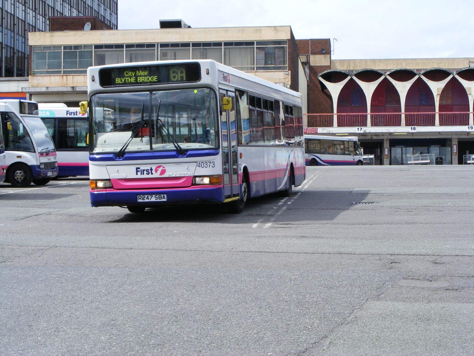 First PMT 40373 R247SBA